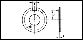 DIN 432